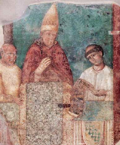 Bonifatius VIII proklamerar Jubelåret 1300. San Giovanni in Laterano, Rom.